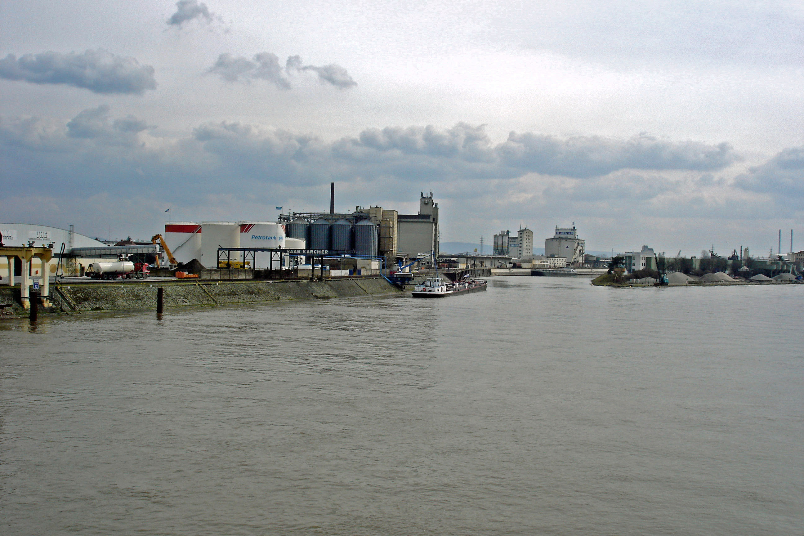 Der Hafen in Hanau von der Steinheimer Bruecke aus